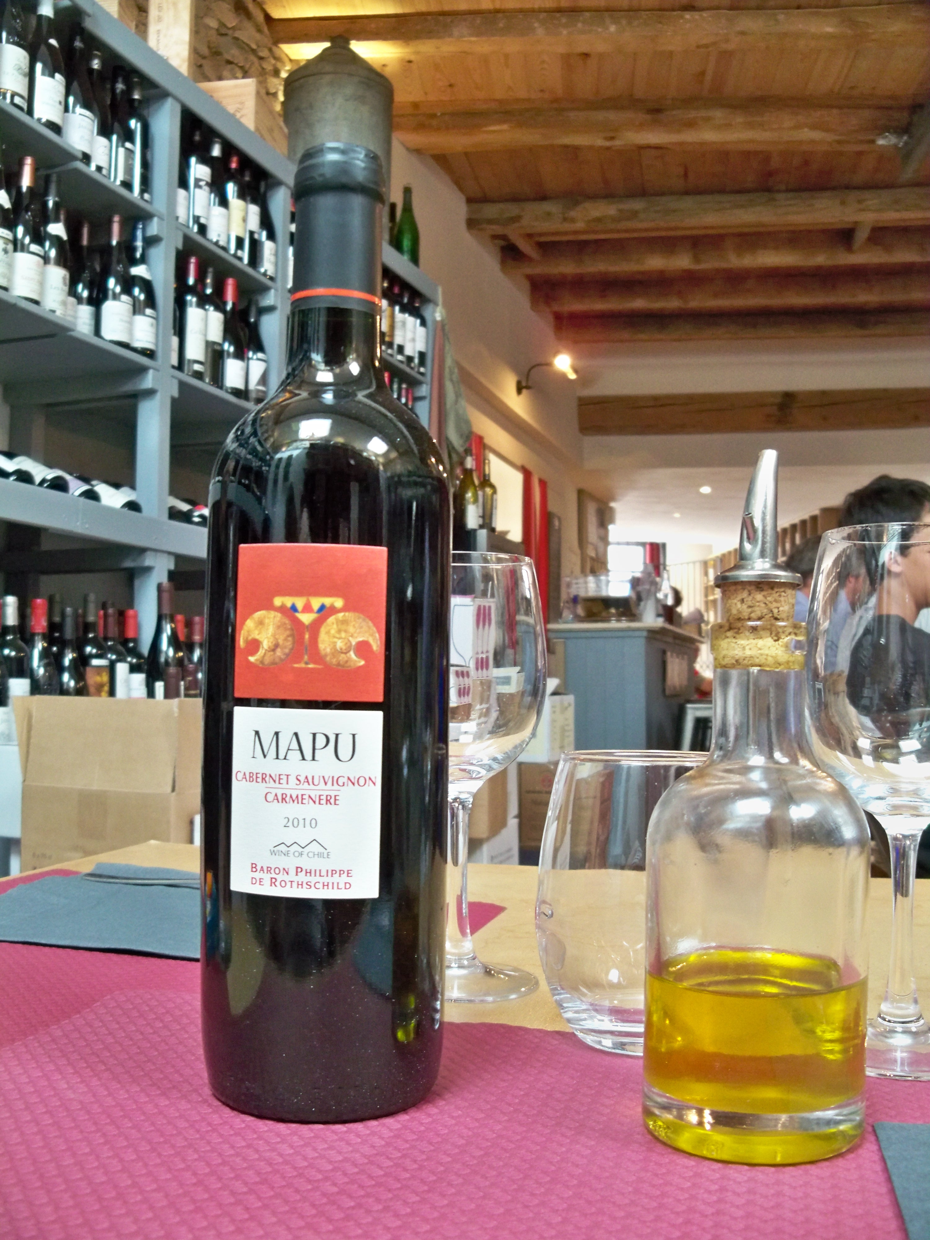 Vin du Chili